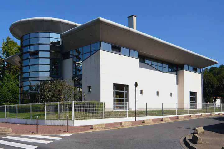 La Ferté-sous-Jouarre, France, Médiathèque Samuel-Beckett